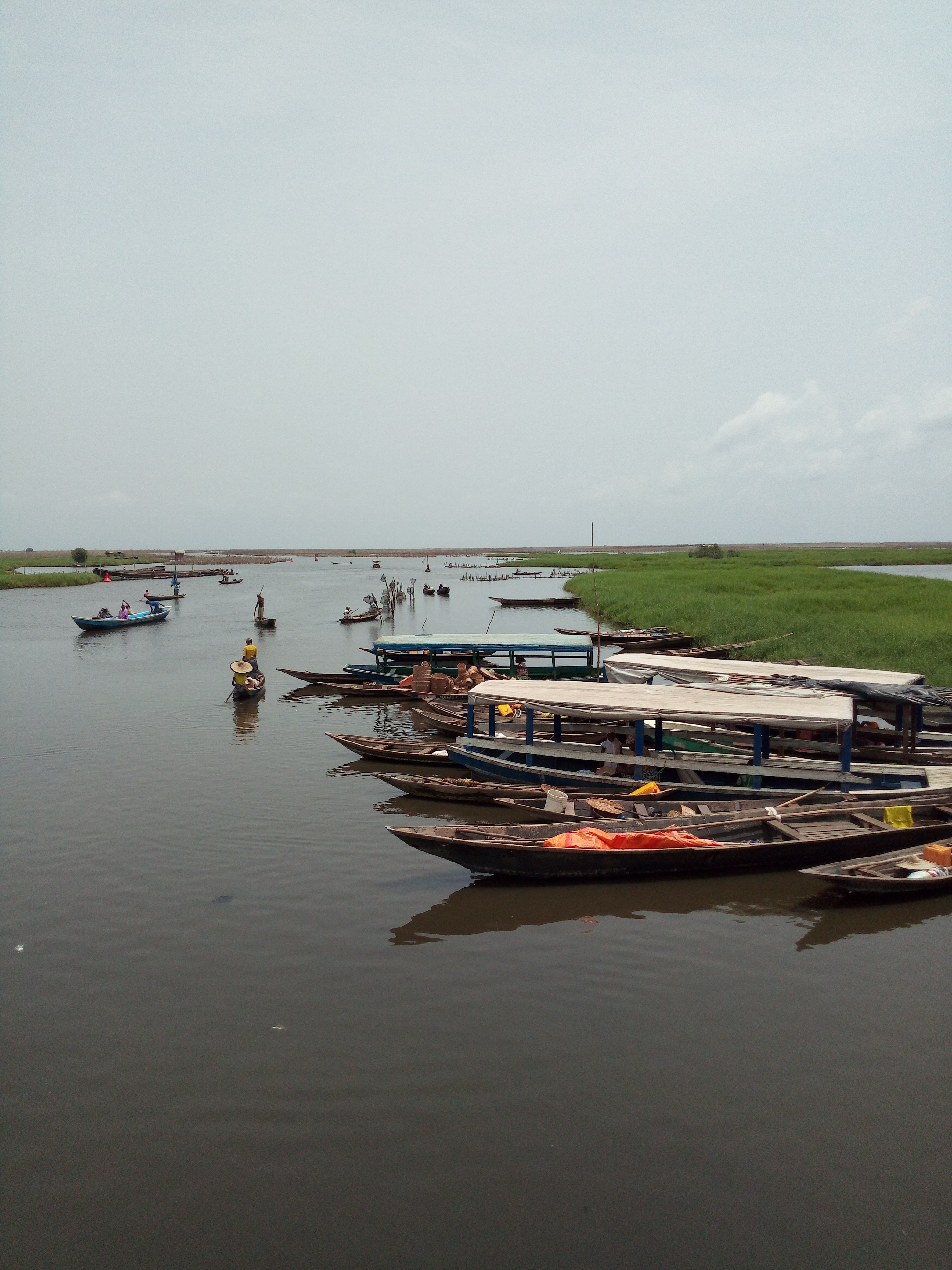 vaste étendue d'eau au Bénin qui relie la commune d'Abomey Calavi et la commune de Sô -Ava. ce lac permet au Bénin de bénéficier d'un village touristique (Ganvier) où les maison son construite sur la surface de l'eau This is an image with the theme "Africa on the Move or Transport" from: Benin